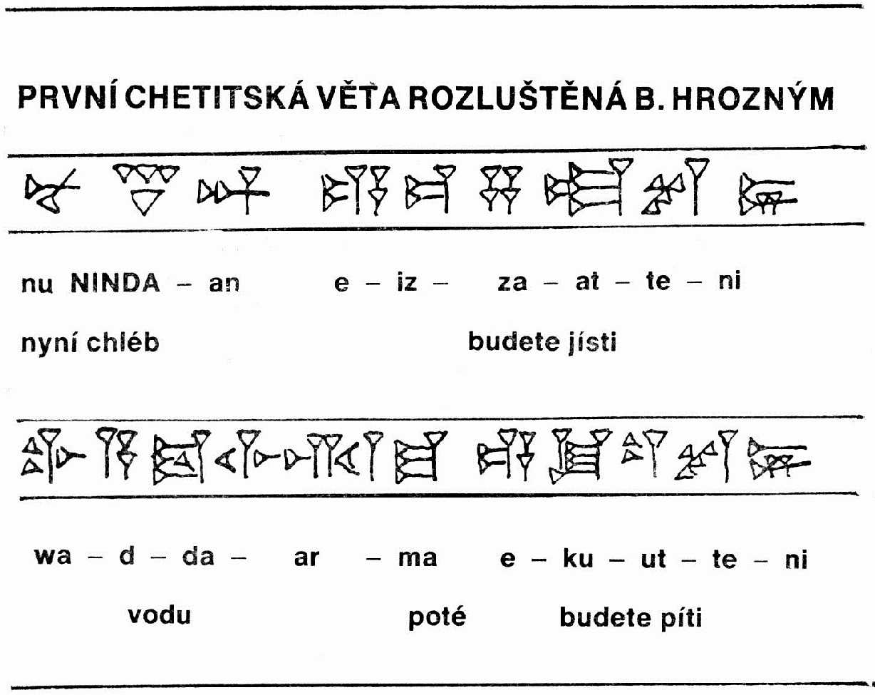 Obrázek ukazuje první chetitskou větu rozluštěnou Bedřichem Hrozným.